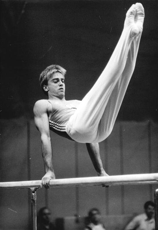 Sylvio Kroll ADN-ZB Oberst 25.8.88 Berlin: Kürturnen -Der Cottbuser DDR-Meister Silvio Kroll gewann einen Kürwettkampf der DDR-Turner in der Saefkow-Halle mit 115,50 Punkten. Es war der letzte Auftritt der DDR-Athleten vor den Olympischen Spielen in Soul.